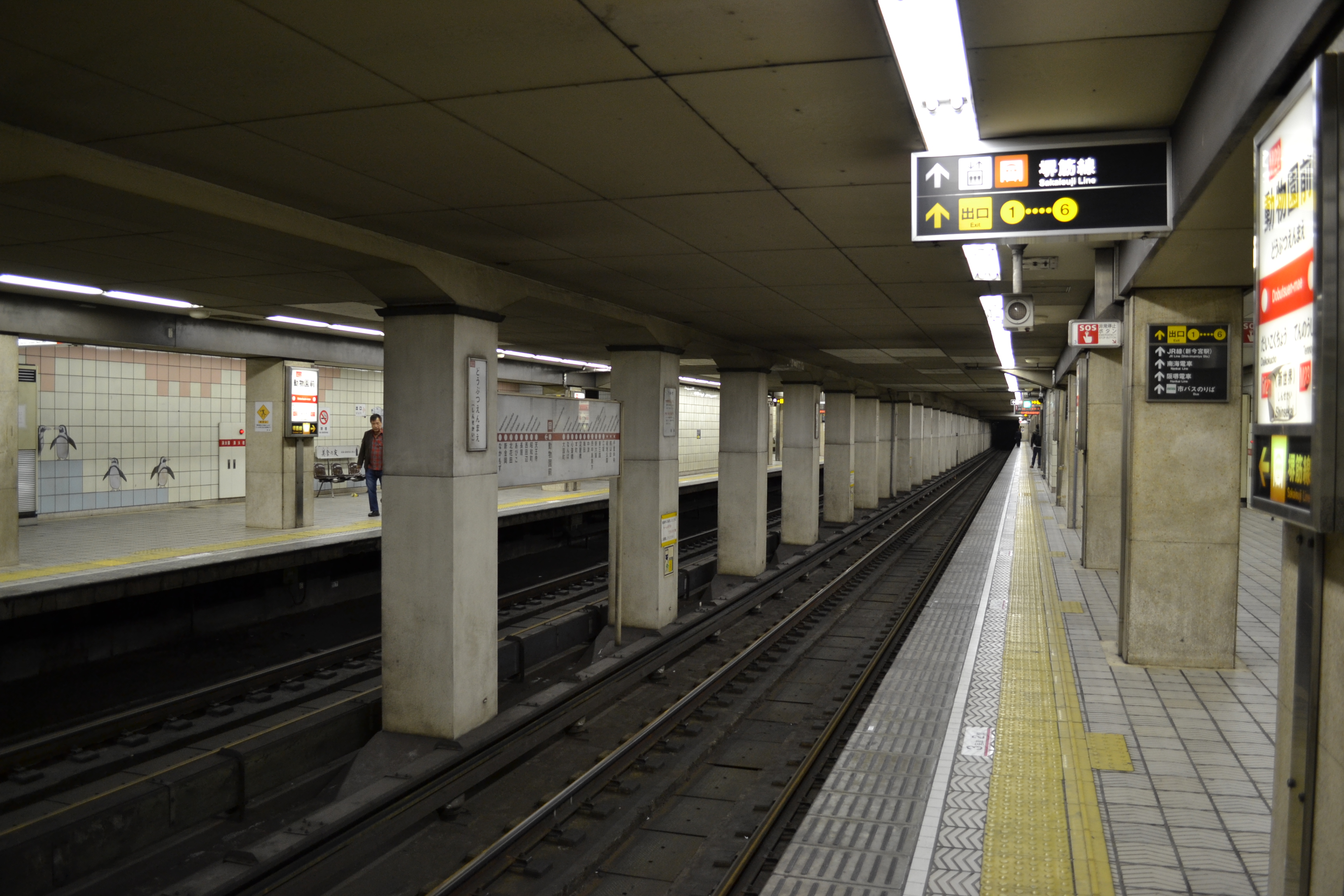 動物園前駅御堂筋線プラットホーム